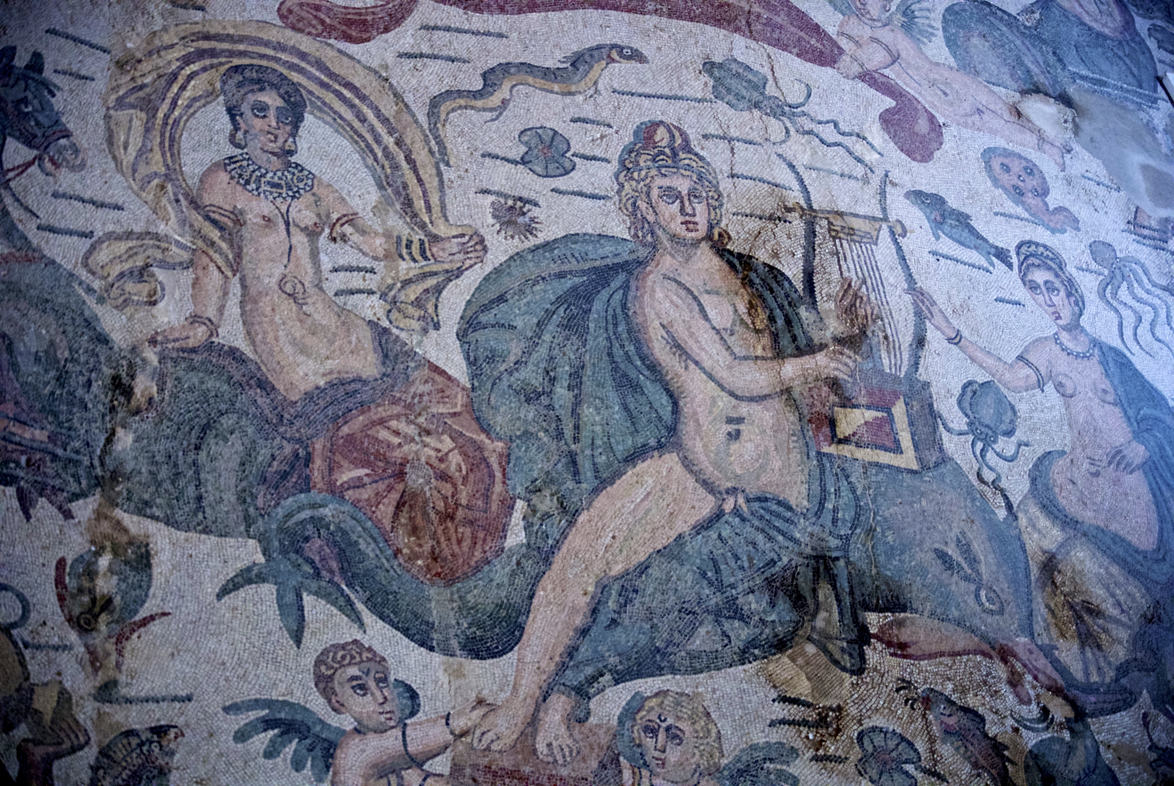 Piazza Armeria-Villa Romana del Casale - Salle d' Arion